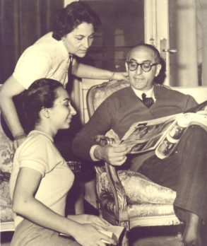 Es una foto del presidente Frondizi con su espoza, (Elena Faggionatto de Frondizi), y la ihja del matrimonio Elena.